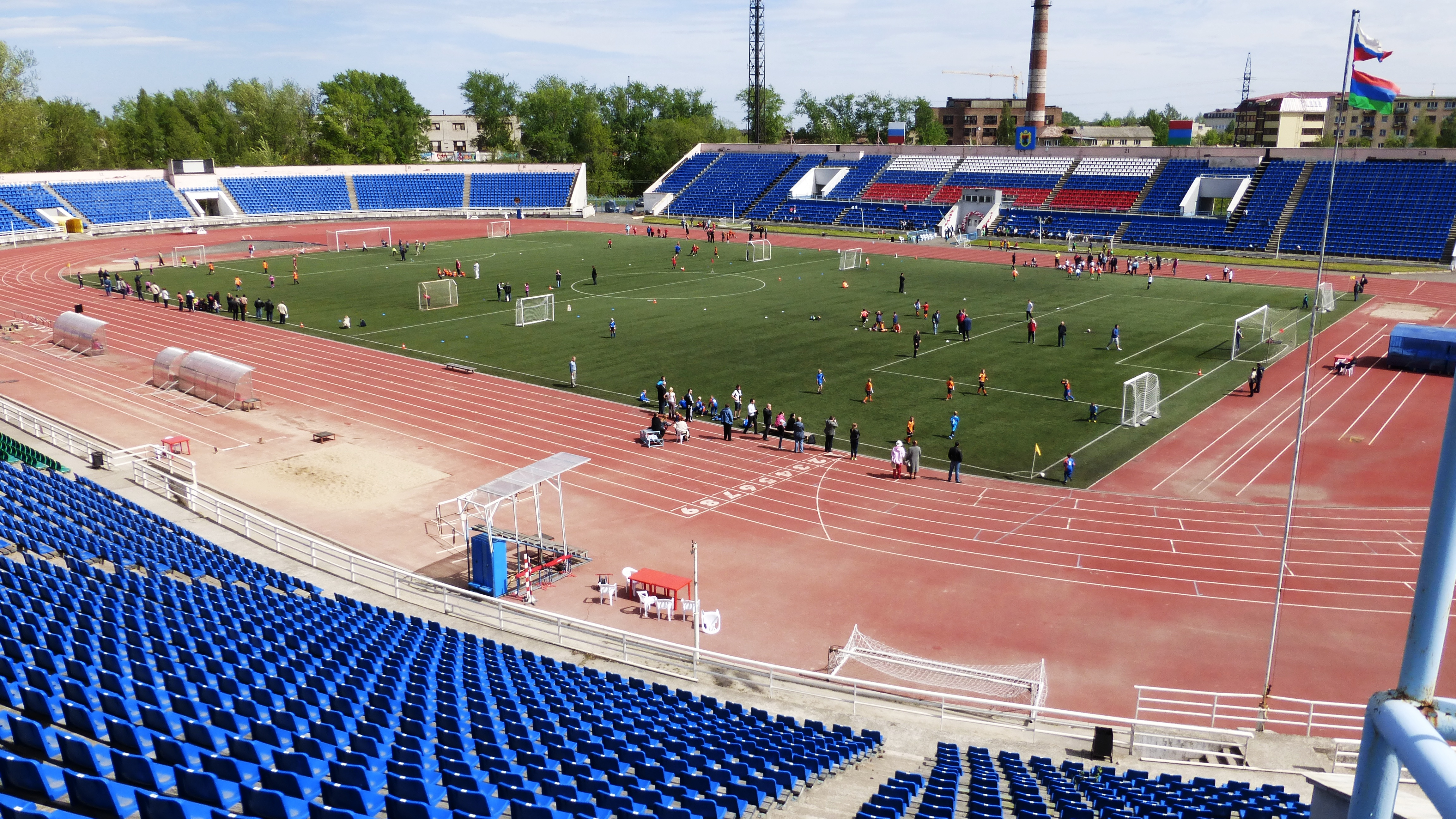 Республиканский стадион "Спартак" в Петрозаводске. (ул.Герцена)